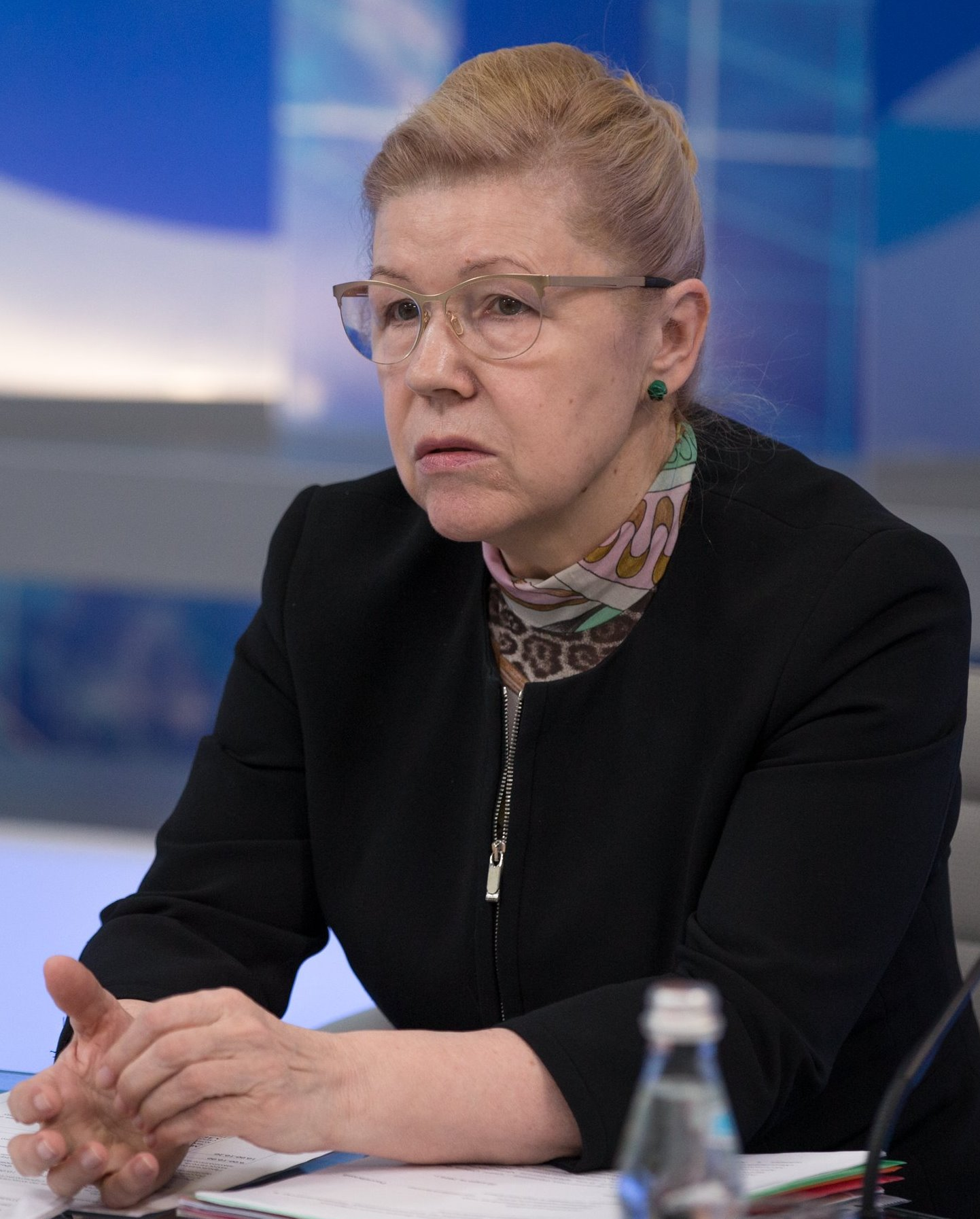 Елена Борисовна Мизулина (род. 1954) — российский государственный и политический деятель